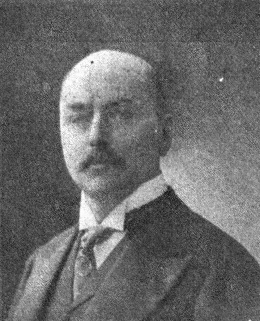 Österreichischer Politiker, Reichsratswahl 1907, Name siehe Dateiname